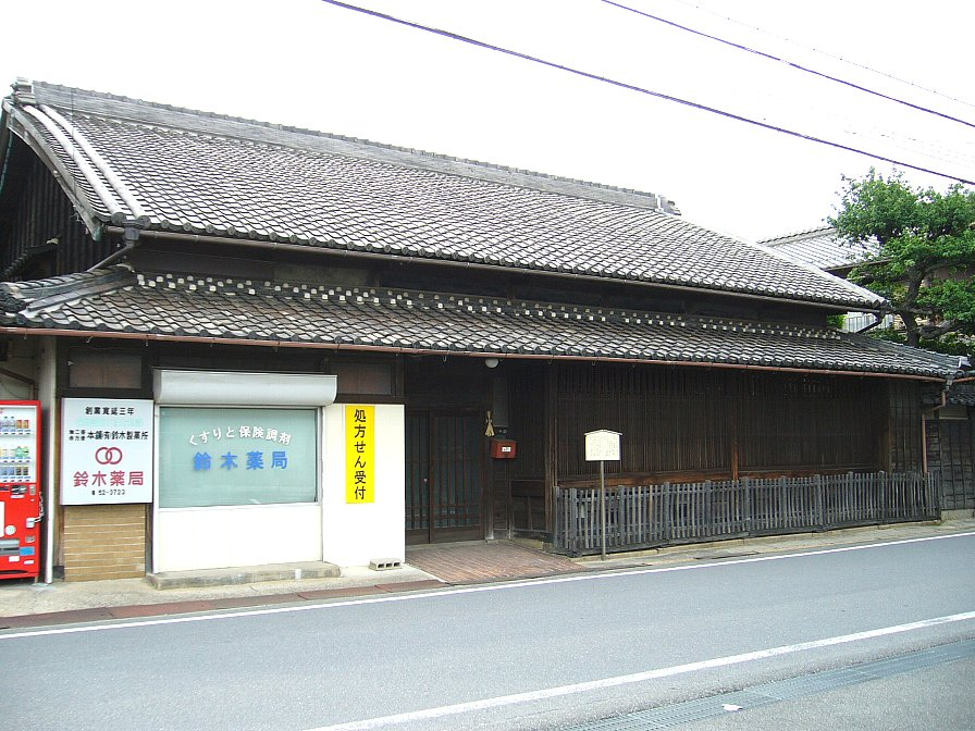 嘉永5年（1852年）に建設された鈴木薬局の建物（四日市市赤堀1丁目）